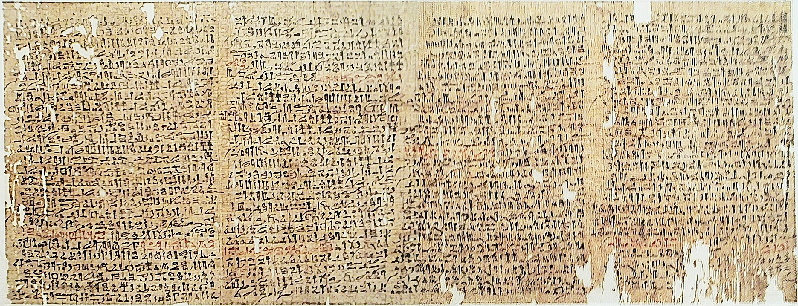 Merged photos depicting a copy of the Ancient Egyptian papyrus commonly known as "The Westcar Papyrus", sometimes also known by the longer name "Three Tales of Wonder from the Court of King Khufu", written in hieratic text. Photo(s) taken at the Altes Museum, Berlin, later merged and cropped using PhotoShop. Catalog number: P 3033.